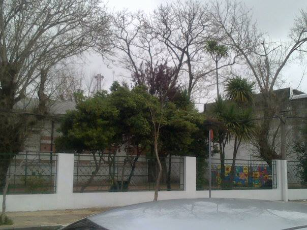 Foto tomada de uno de los laterales del Jardín de Infantes N° 213 (Montevideo), observandose el Patio